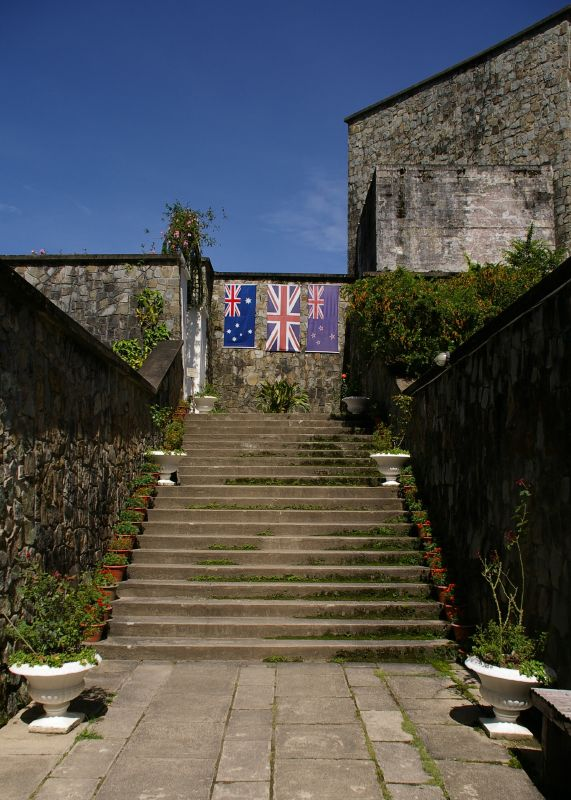 Australia, United Kingdom and New Zealand flag in Kundasang War Memorial, Ranau, Sabah, Malaysia.